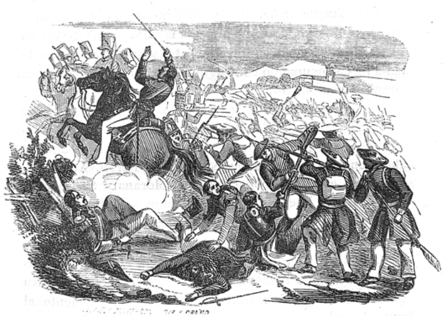 Lucha entre la caballería isabelina y la infantería carlista en la batalla de Huesca, 24 de mayo de 1837